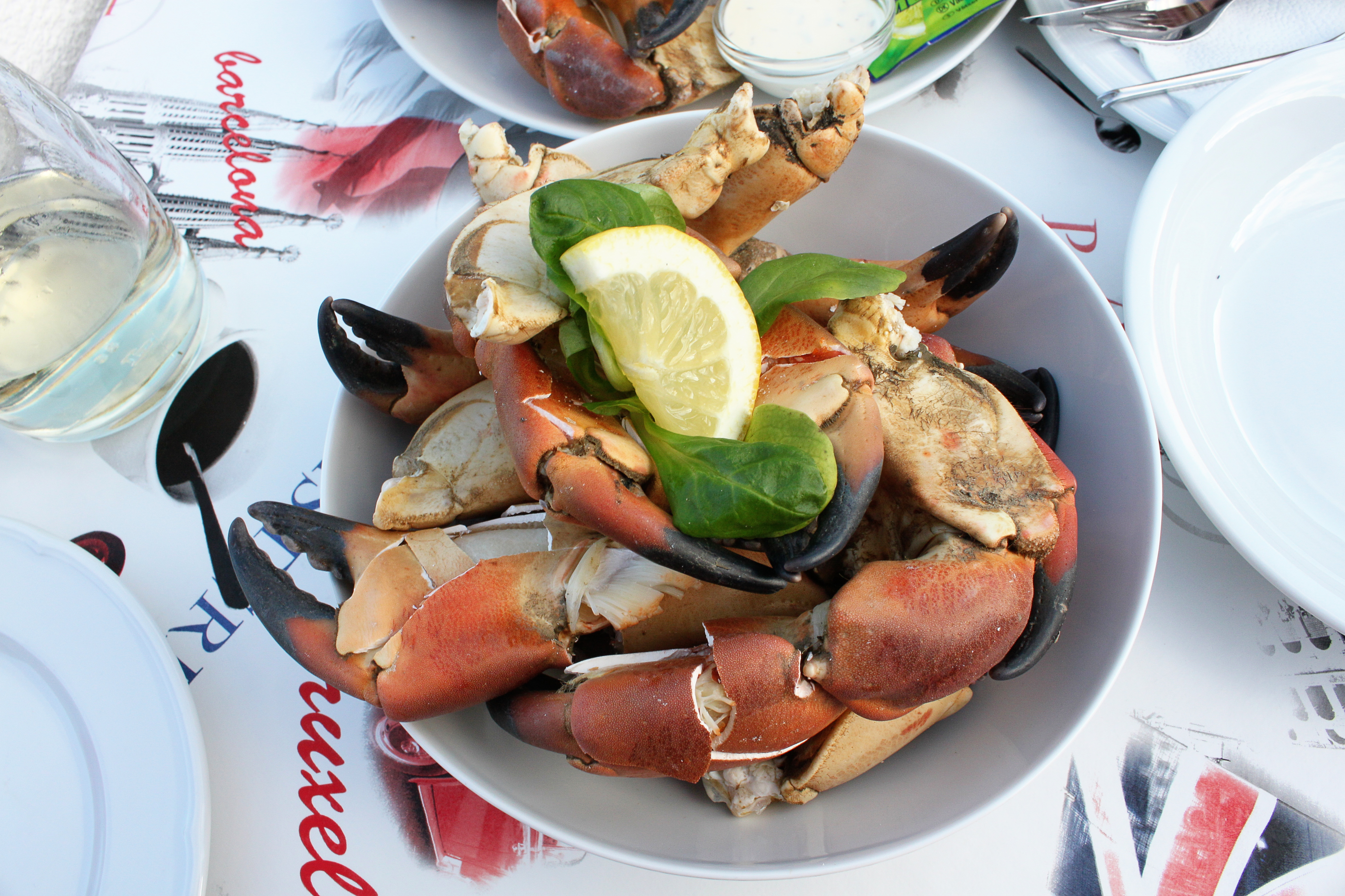 Helgoland, Knieper